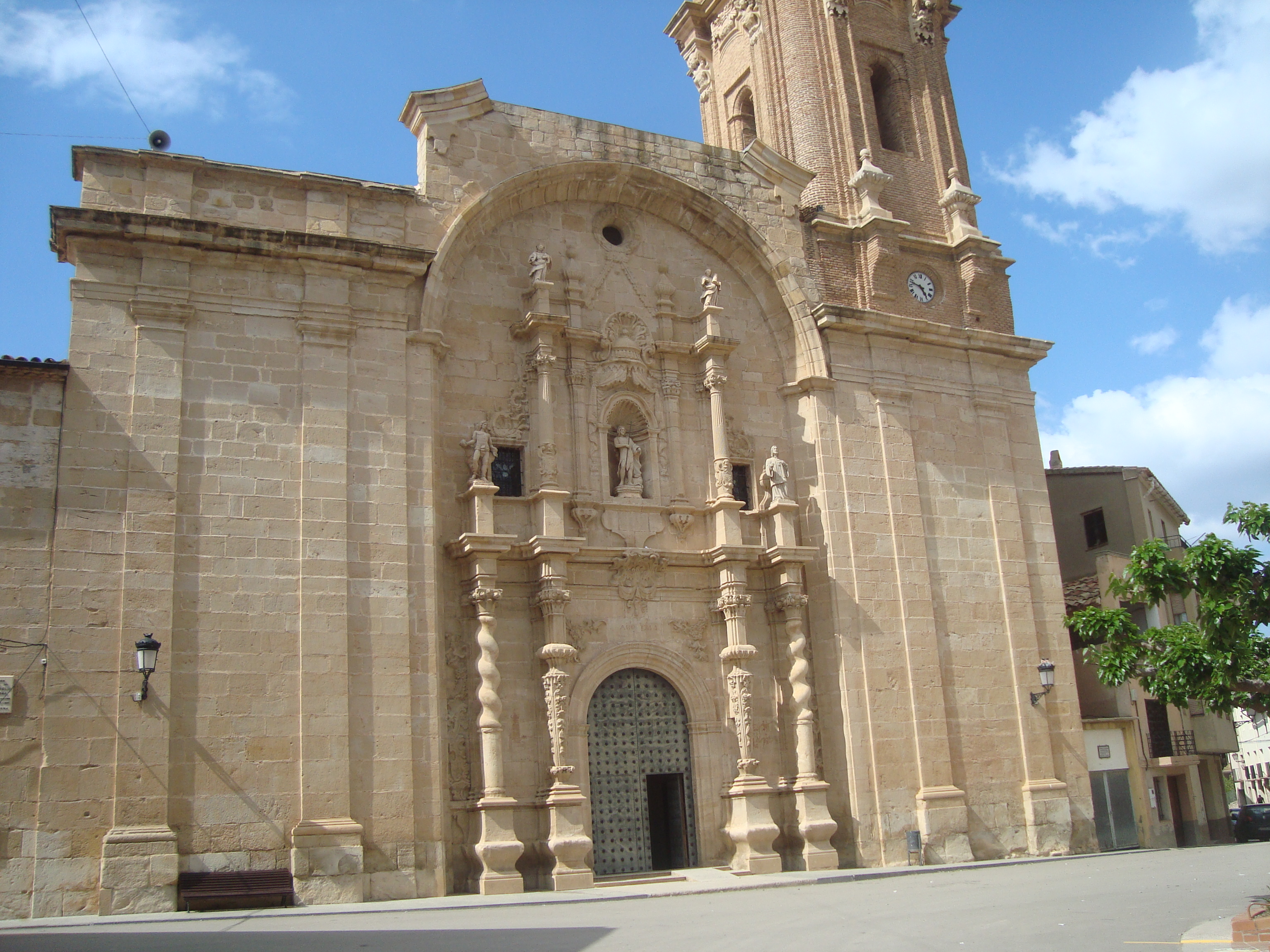 Iglesia de San Juan Bautista de Mas de las Matas (Teruel, España)